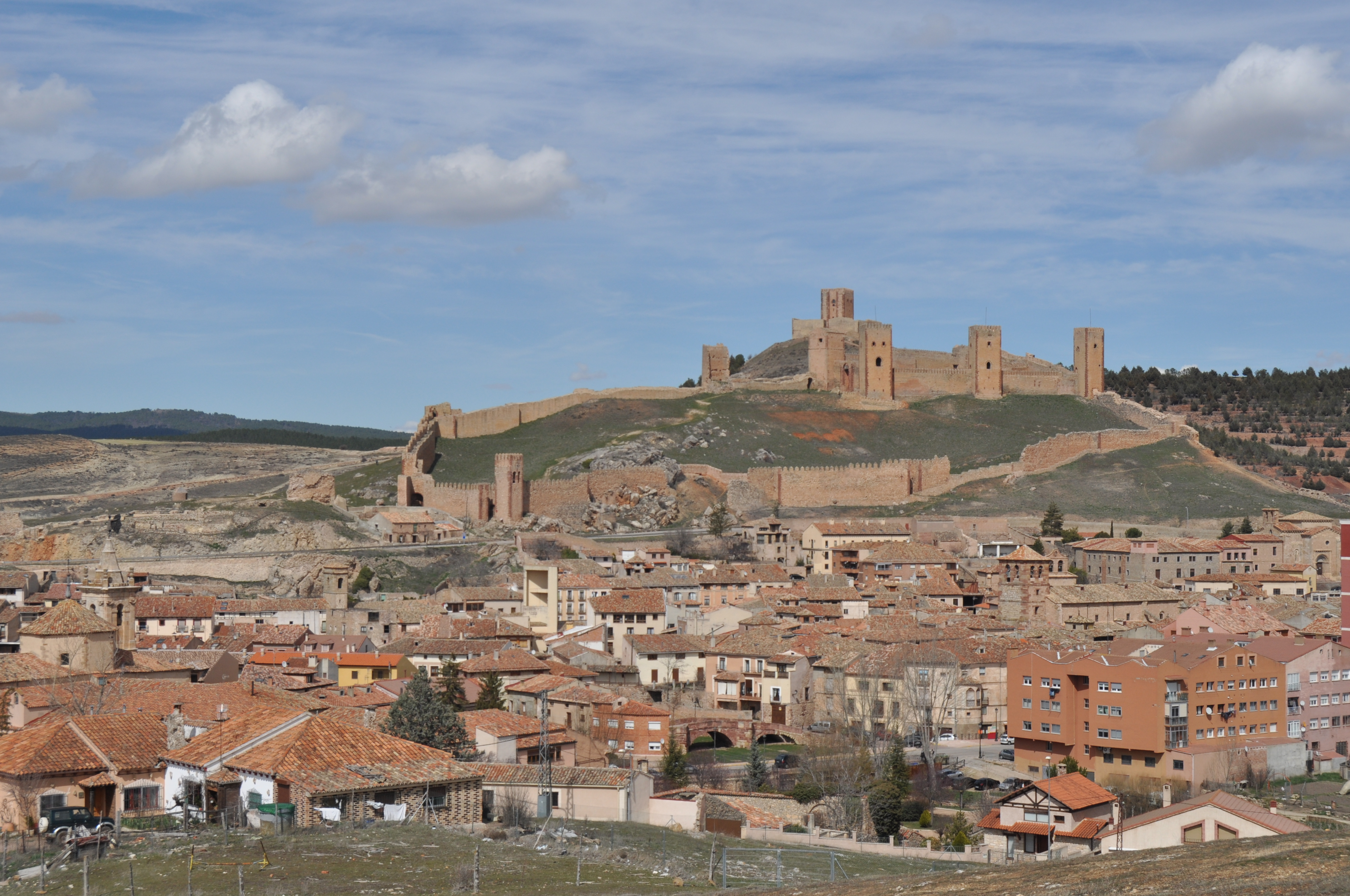 Molina de Aragon - 084